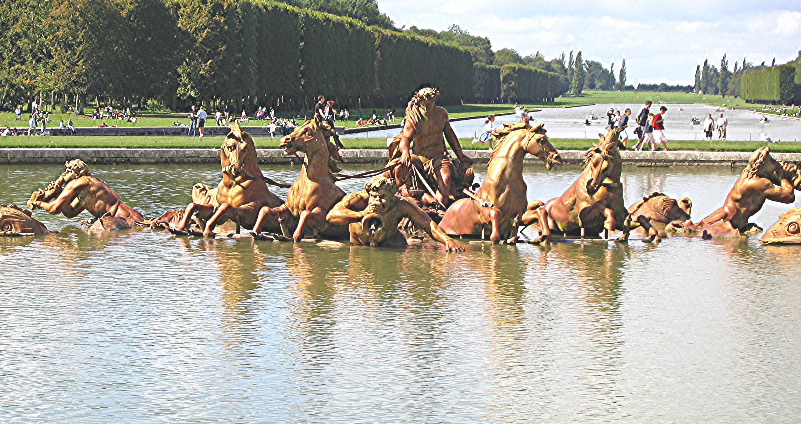 Bassin d'Apollon, jardins de Versailles, photographie personnelle, prise par l'Utilisateur Urban, septembre 2004, GFDL Urban Septembre 2004 Catégorie:Image du parc de Versailles